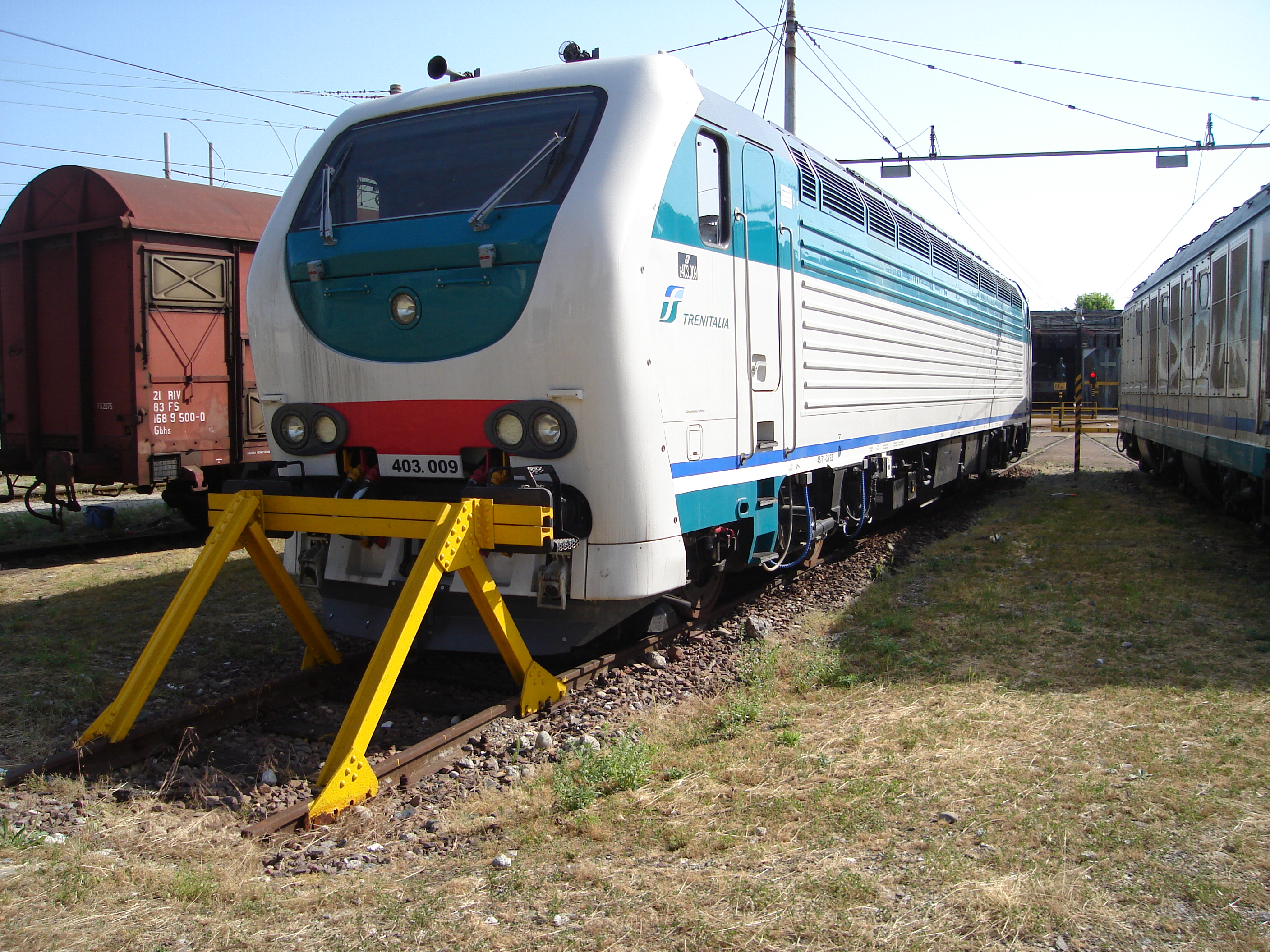 Locomotiva E.403.009 FS